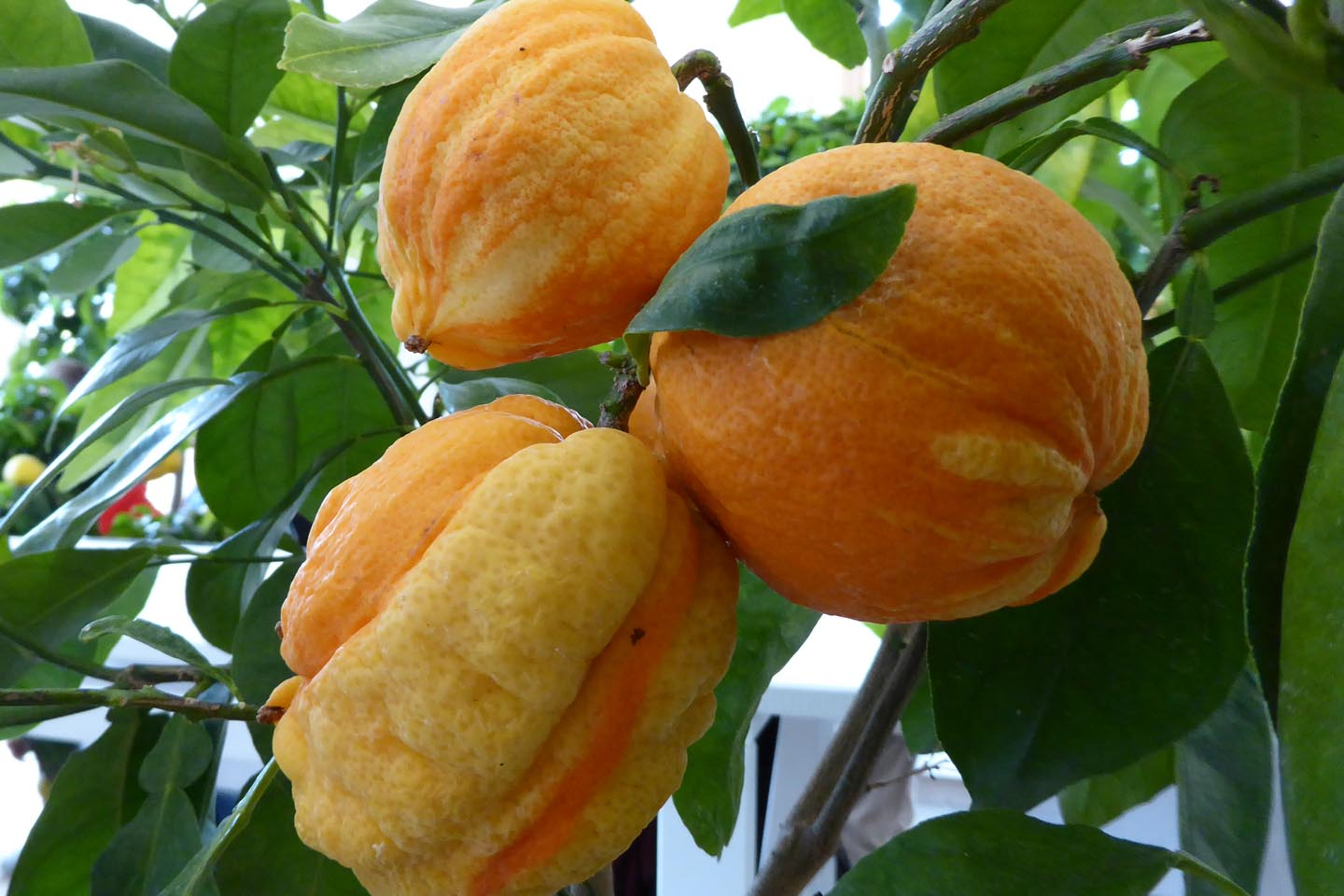 Citrus Bizzarria in der Ausstellung der 3. Sächsischen Zitrustage im Barockgarten Großsedlitz, Mitglied des Arbeitskreises Orangerien in Deutschland e.V., Mai 2015